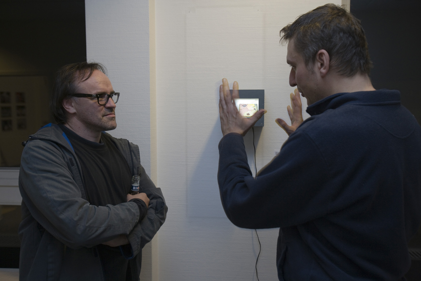 Heinrich Gartentor und Robert Porth bei einem Gespräch zur "Künstlerischen Qualitätserfassung", entstanden anlässlich "BürokARTie" in Münster, 2009.